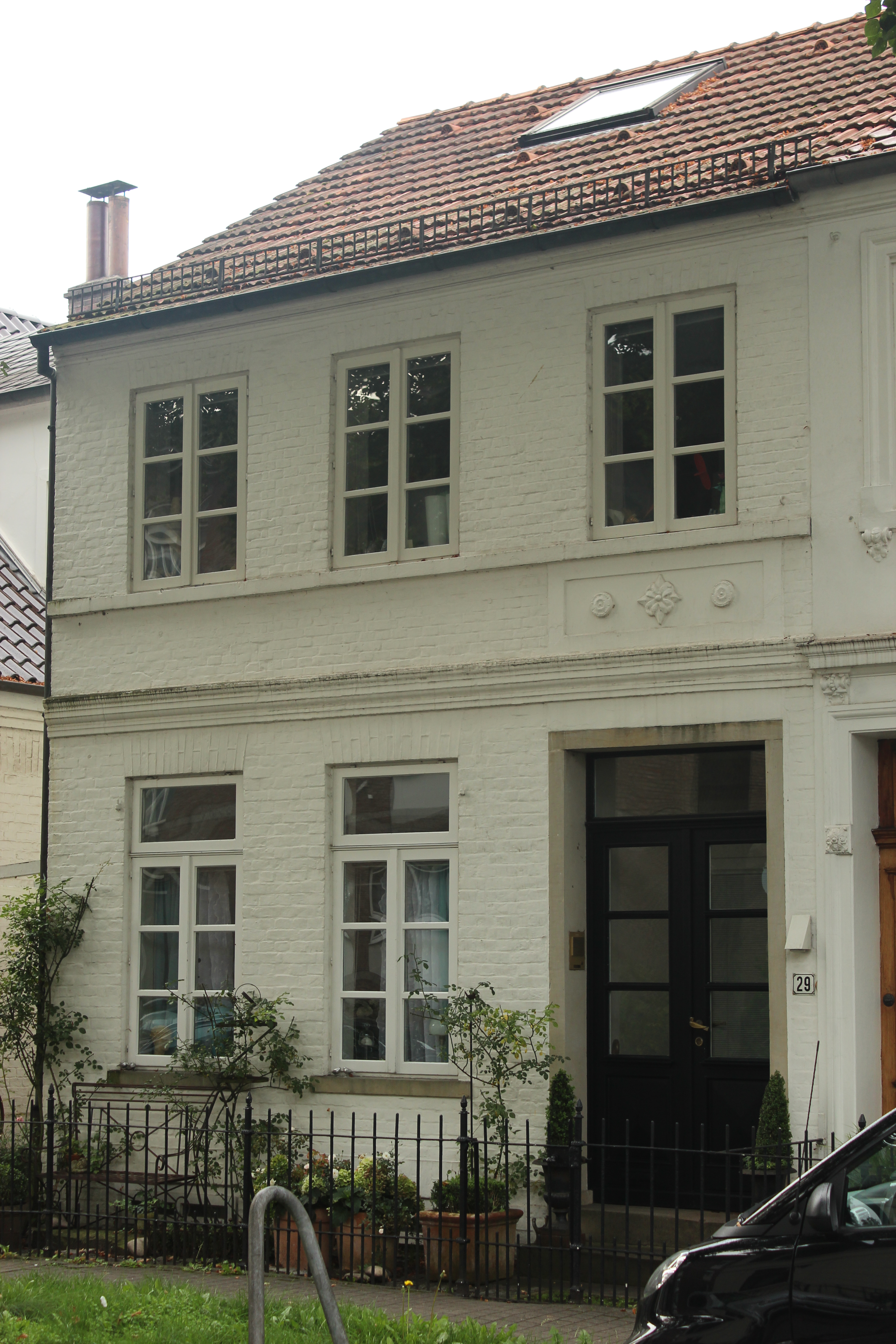 Wohnhaus in Bremen, Weserstraße 29.Das abgebildete Objekt ist ein geschütztes Kulturdenkmal in der Freien Hansestadt Bremen, mit der Nr. 1329 beim Landesamt für Denkmalpflege registriert.